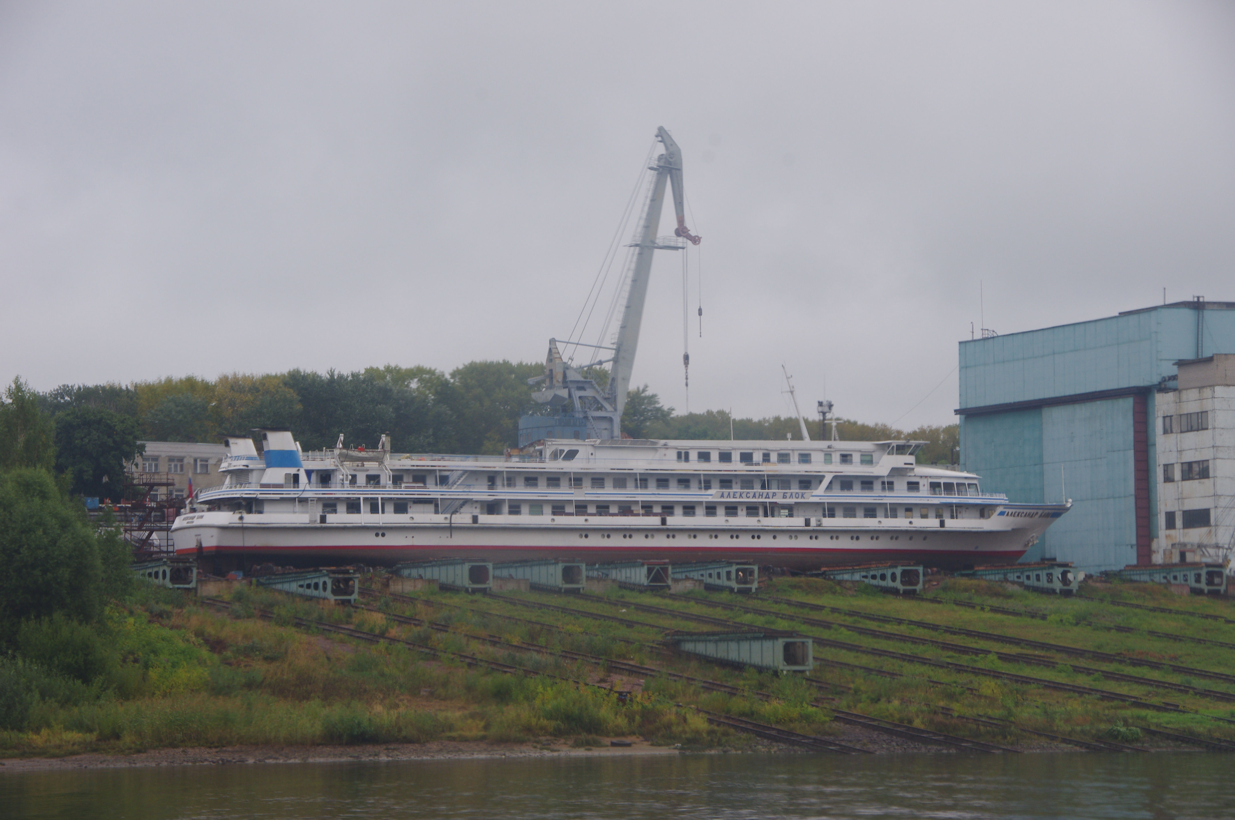 Метеор Брейтово - Рыбинск - Ярославль